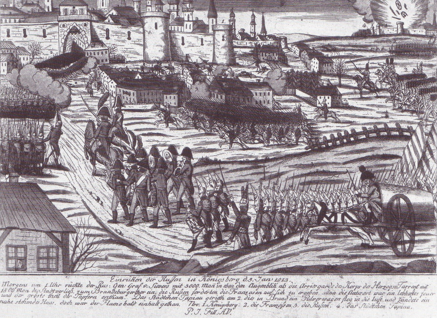 Lithographie zum Einrücken rusischer Truppen in Königsberg i. Pr. am 5. Januar 1813